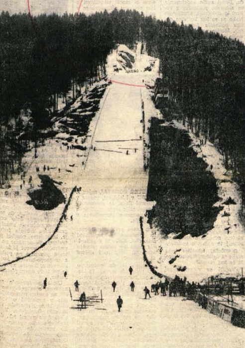 Planica.